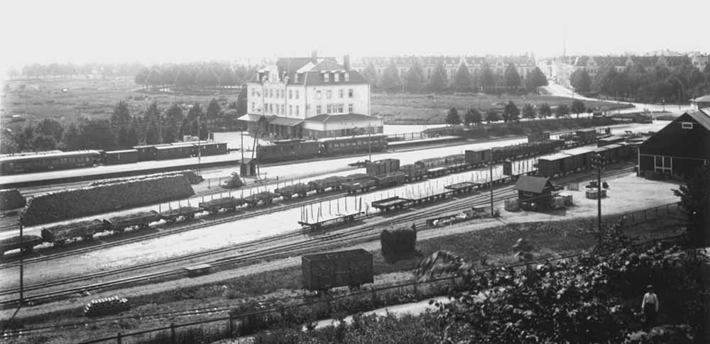 Norrköpings östra järnvägsstation, 1920-tal.